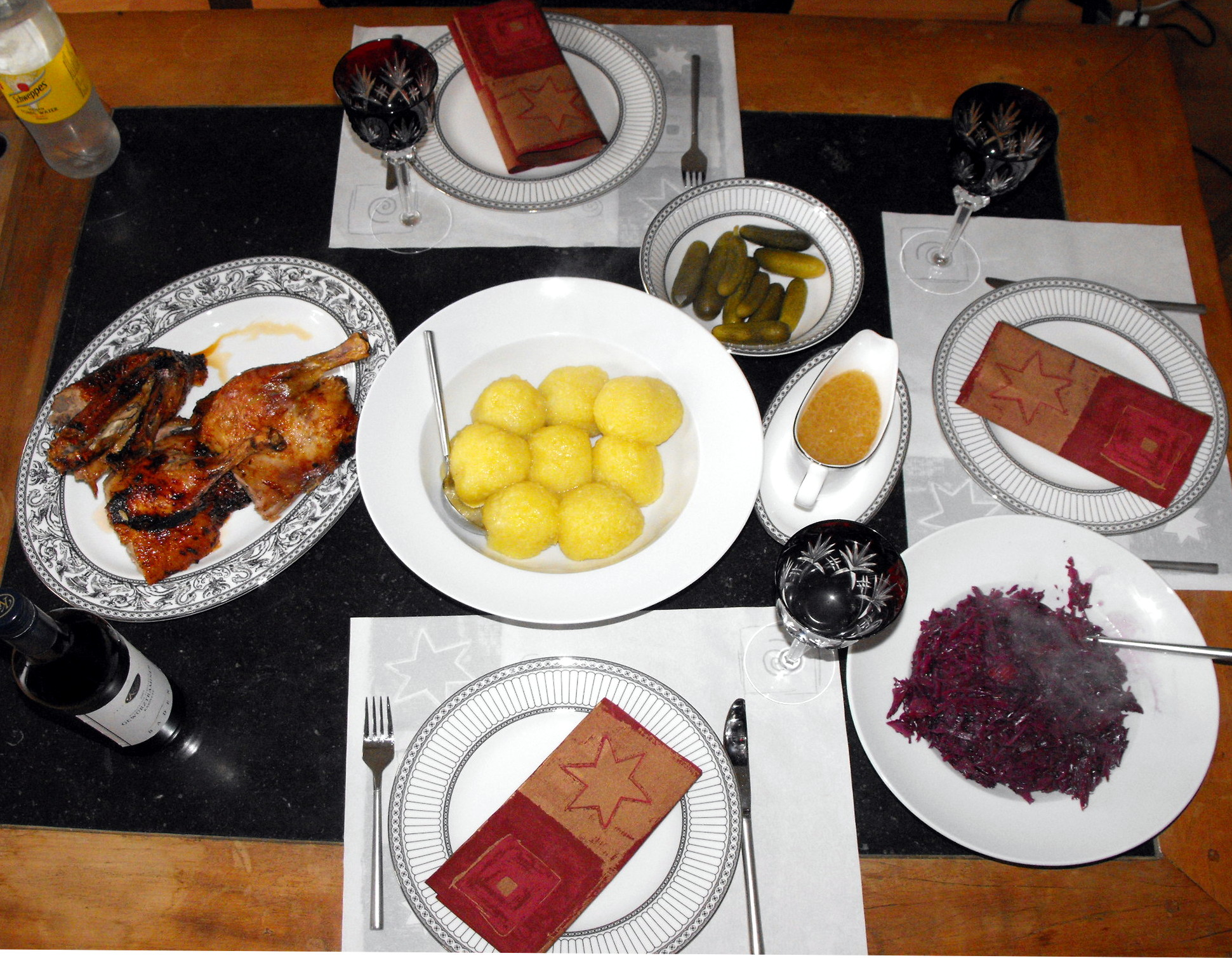 Traditionelles Weihnachtsessen: Ente mit rohen Klößen und Rotkohl (dampfend) Service: Wegdewood, Gläser: Rubinrote Römer